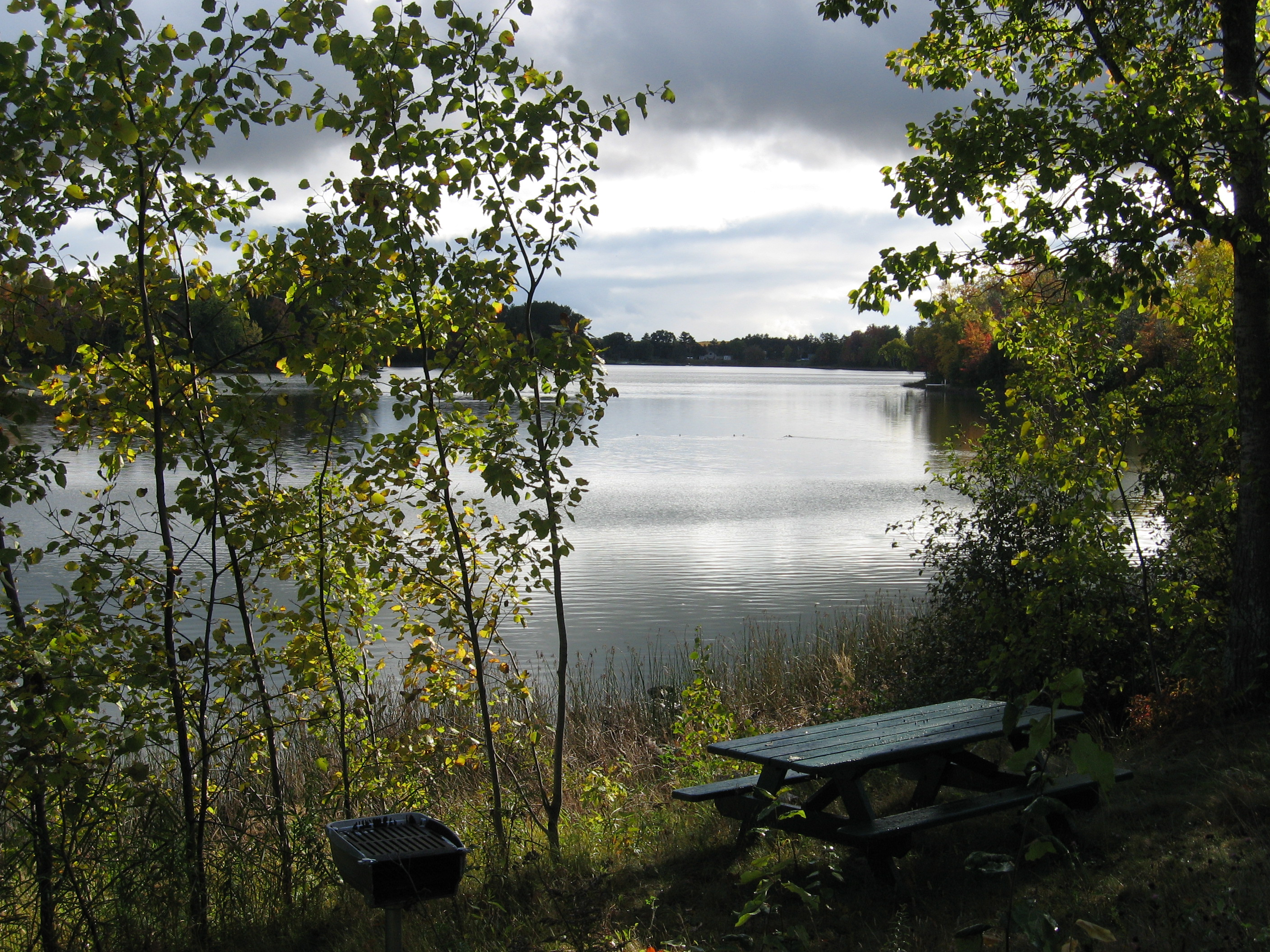 Otter Lake in Elcho, Wisconsin